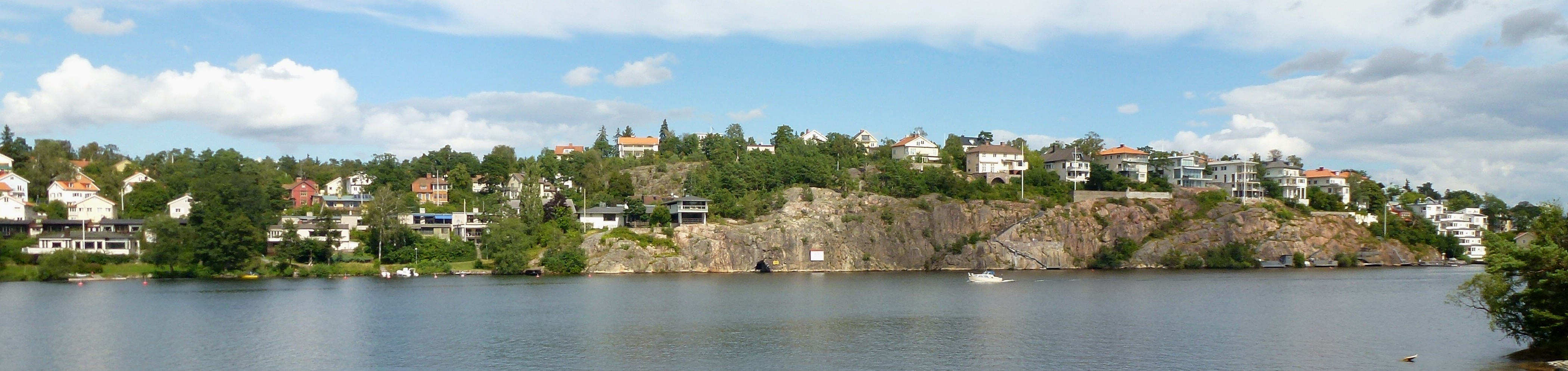 Höglandet, vy från Kärsön